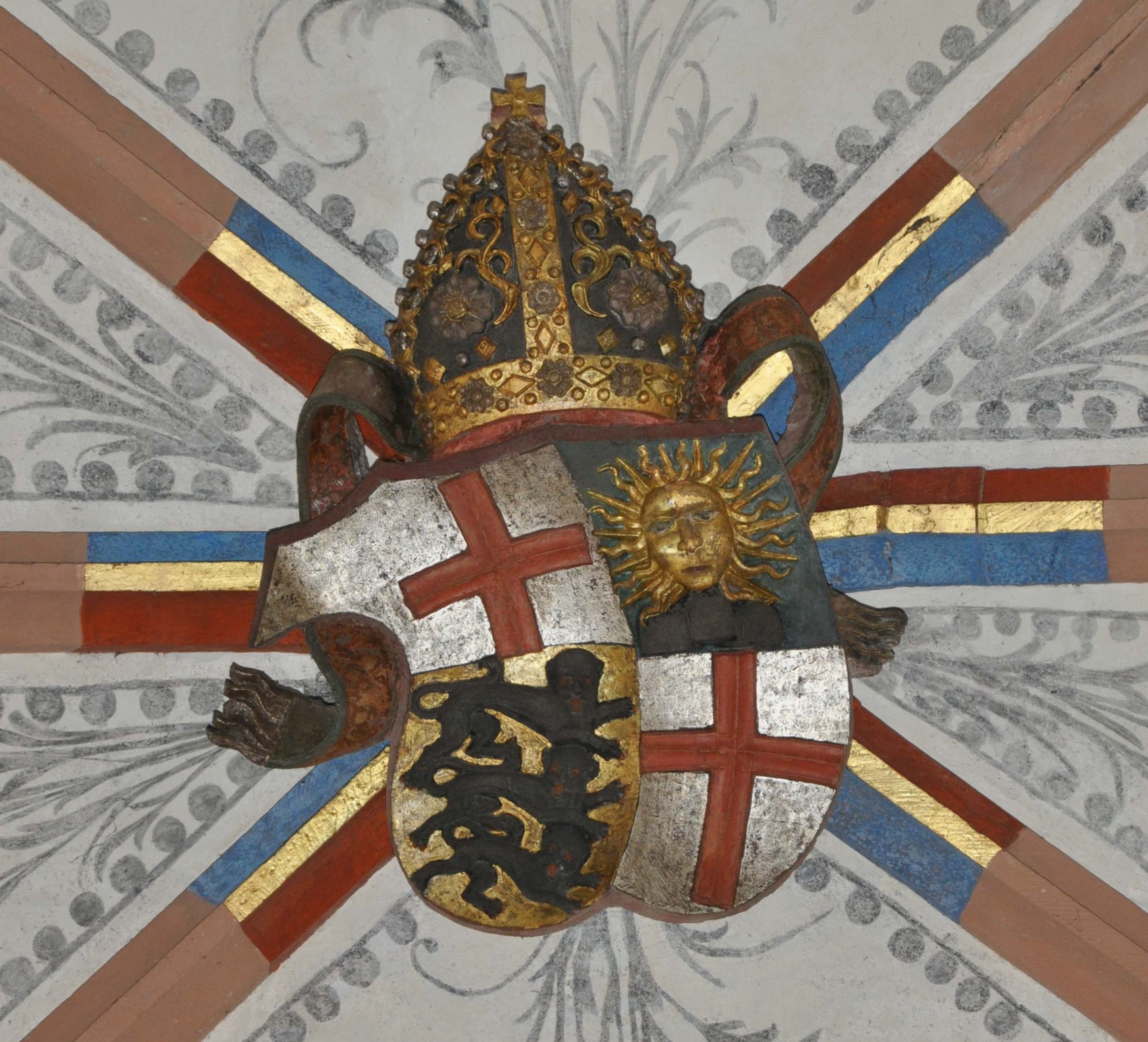 Hallau (Kanton Schaffhausen), Bergkirche St. Moritz Gewölbe im Chor, Schlussstein: Wappen des Konstanzer Bischofs Otto von Sonnenberg